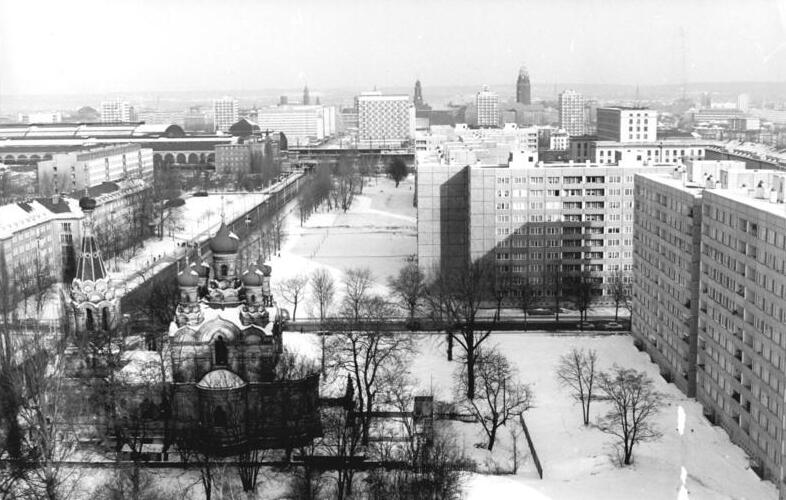 Dresden, Juri-Gargarin-Straße, Russisch-Orthodoxe-Kirche, Winter ADN-ZB Häßler 29.1.85 Dresden: Zum 40.Jahrestag der Zerstörung - Als Verlängerung der Prager Straße durchzieht im Südwesten vom Hauptbahnhof aus die Juri-Gagarin-Straße das Stadtzentrum. Die 1872 - 74 erbaute Russisch-Orthodoxe-Kirche (Vordergrund) blieb als eines der wenigen historischen Bauwerke der Innenstadt im 2.Weltkrieg erhalten